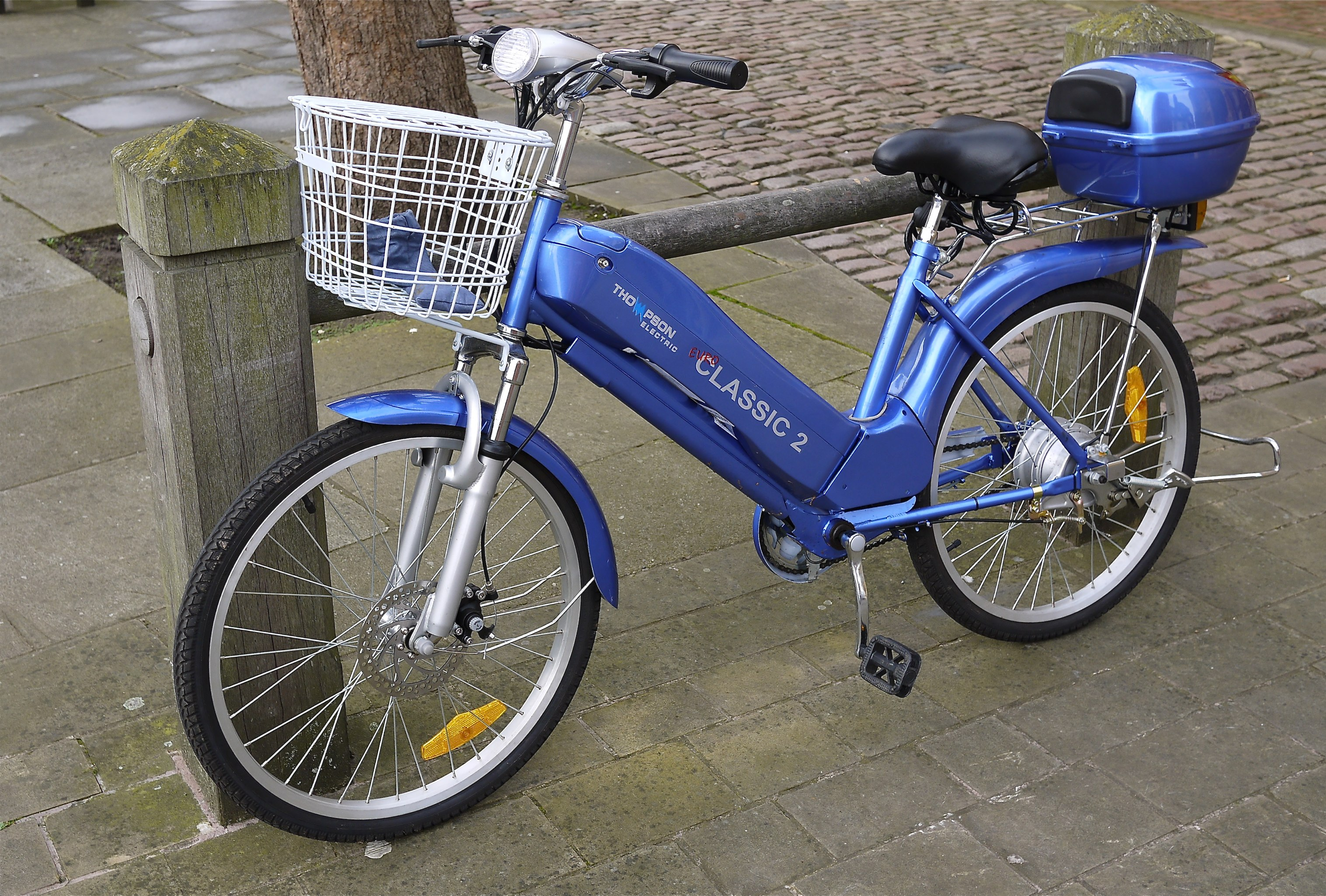 Panasonic GF3 20mm Lens